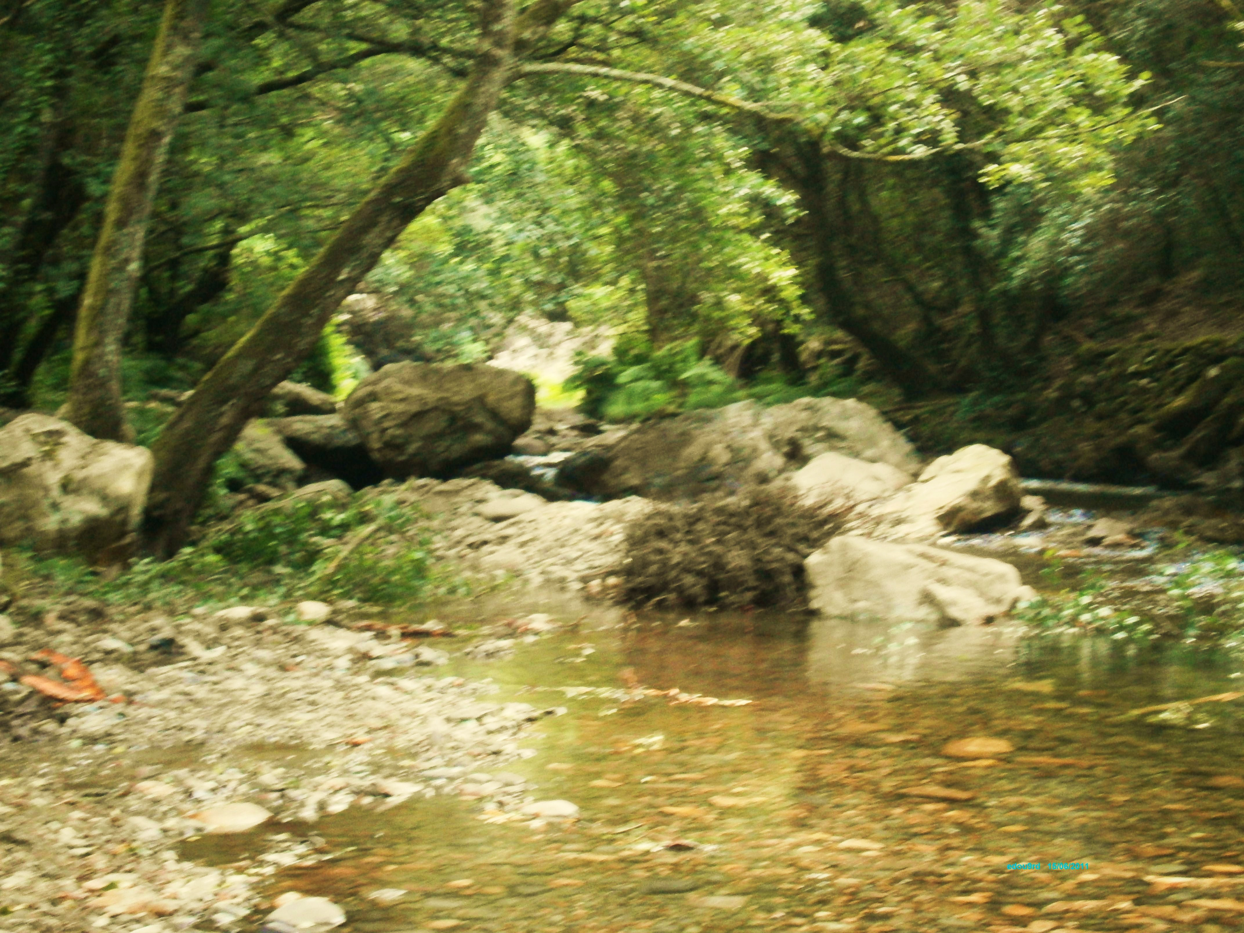 Praia Fluvial das Fragas de S. Simão